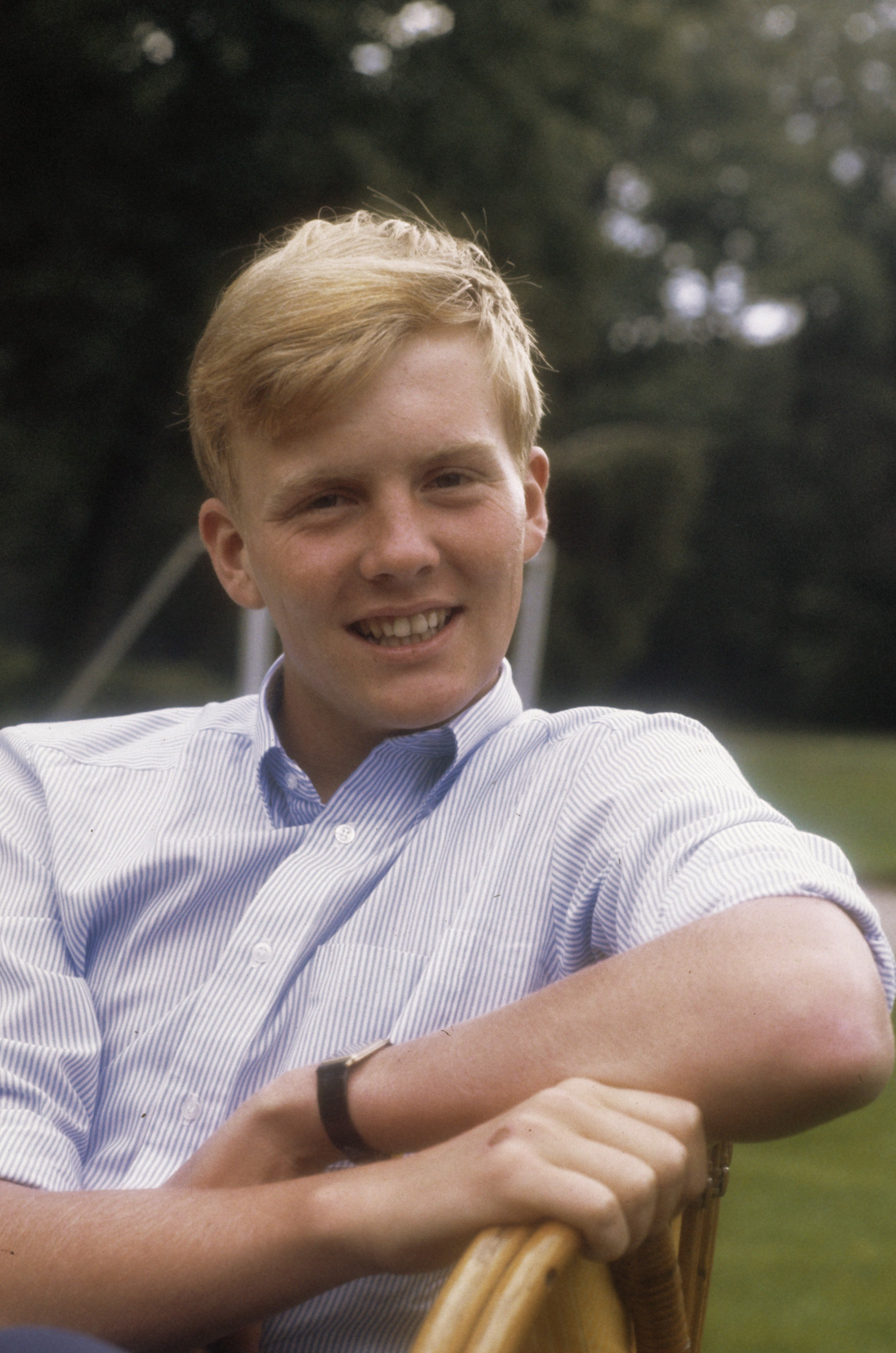 Collectie / Archief : Fotocollectie Anefo Reportage / Serie : [ onbekend ] Beschrijving : Foto uurtje Koninklijke Familie op Huis ten Bosch ; Prins Willem Alexander Datum : 8 augustus 1986 Trefwoorden : Koninklijke familie Persoonsnaam : Willem-Alexander, Prins van Oranje Fotograaf : Croes, Rob C. / Anefo Auteursrechthebbende : Nationaal Archief Materiaalsoort : Dia (kleur) Nummer archiefinventaris : bekijk toegang 2.24.01.06 Bestanddeelnummer : 253-8987